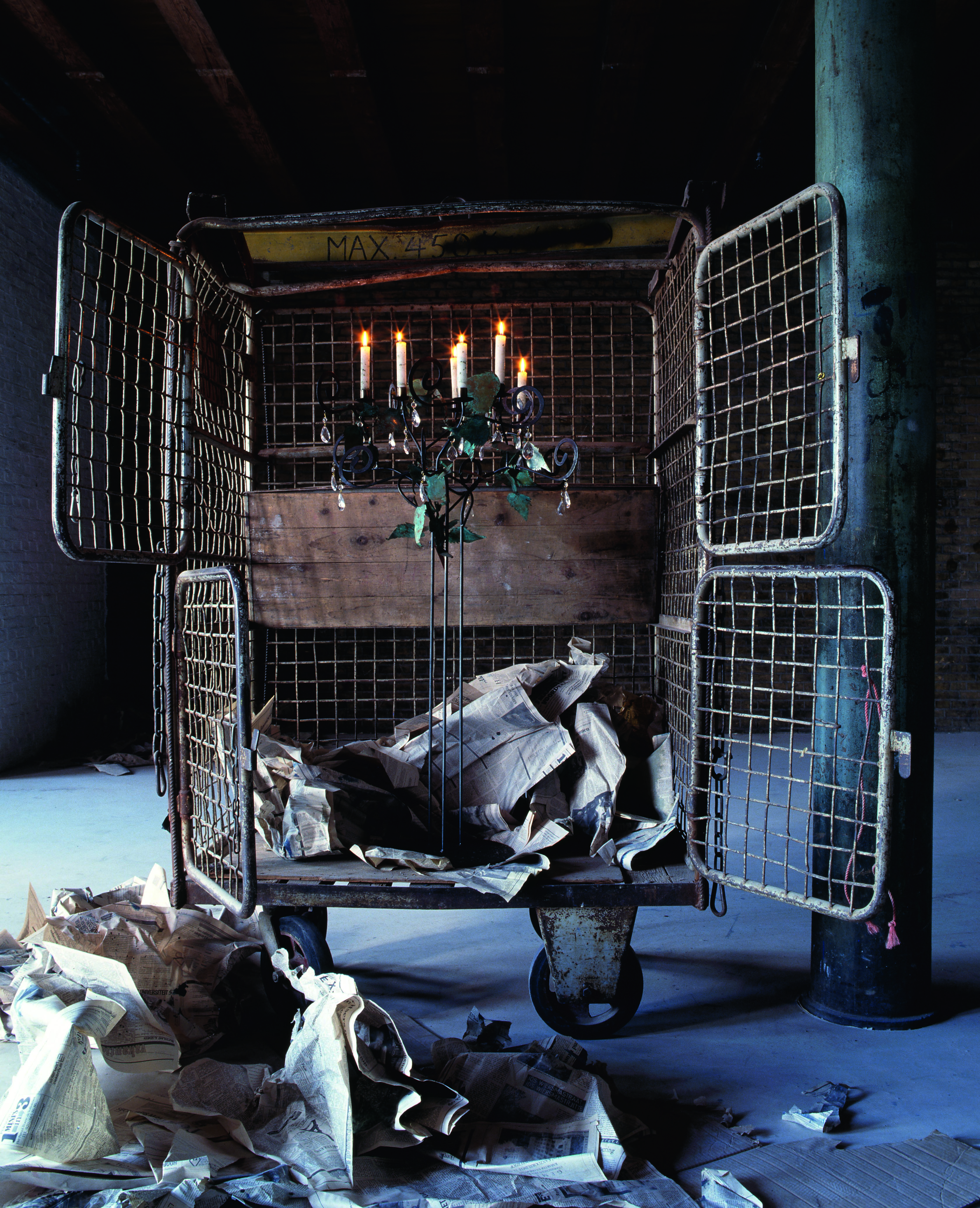 Handgemaakte krullenkandelaar van Maroeska Metz uit 1989.